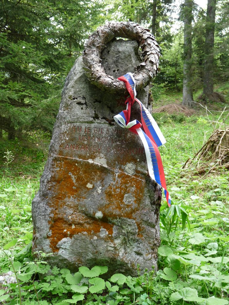 Partizanski spomenik nad Vodiško planino, ustanovno mesto Cankarjevega bataljona 5. 8. 1941